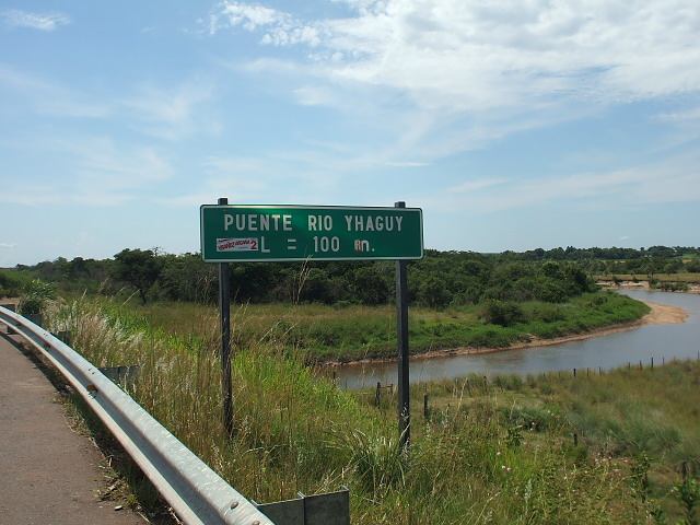 Río